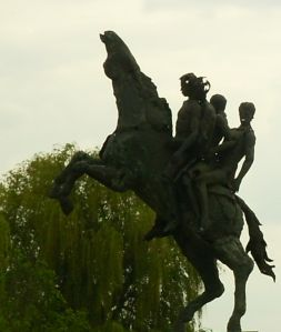 Standbeeld Ros Beiaard - eigen foto